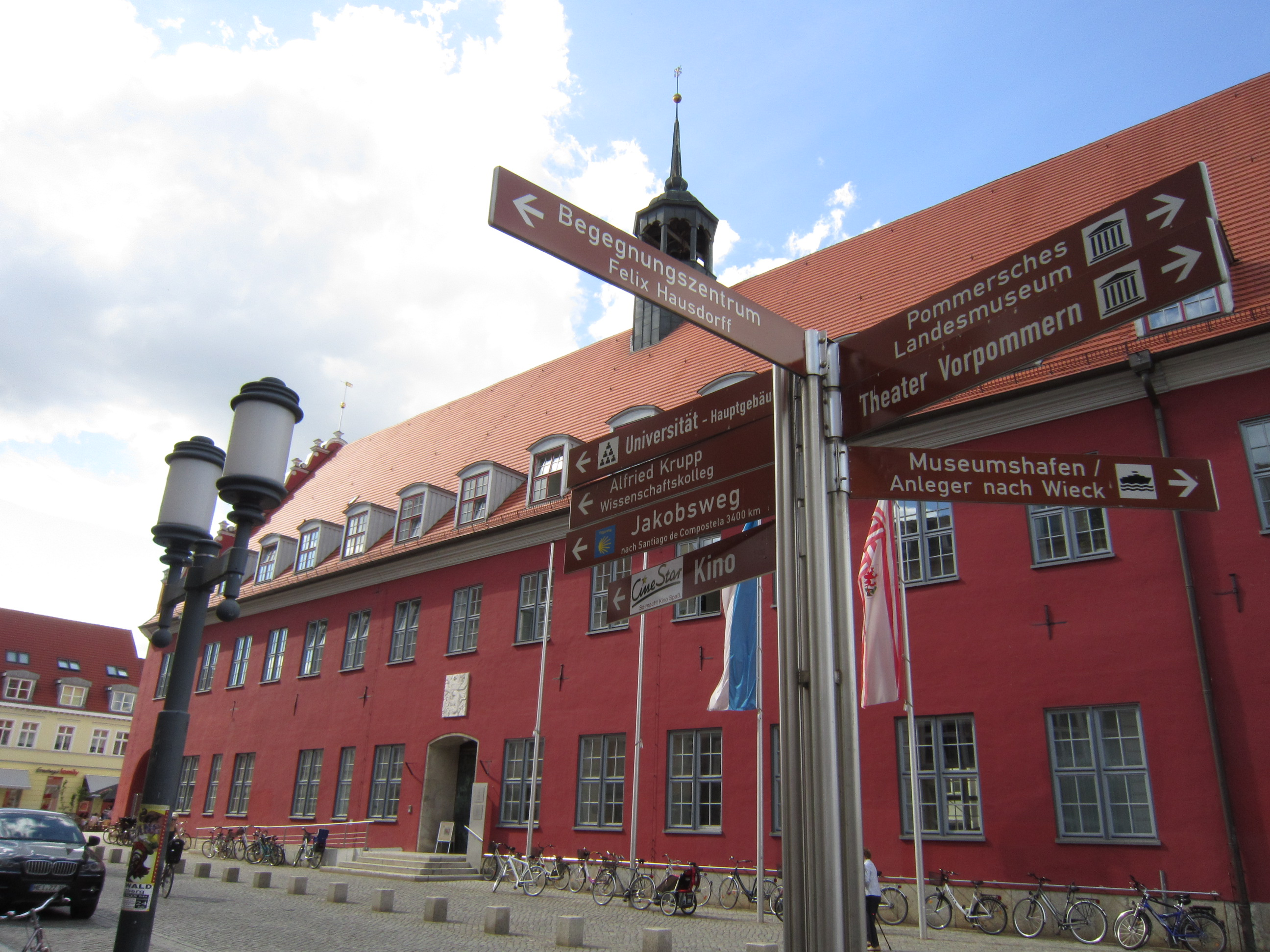 Rathaus in Greifswald mit Hinweis auf den Jakobsweg (3.400 km bis Santiago de Compostela)